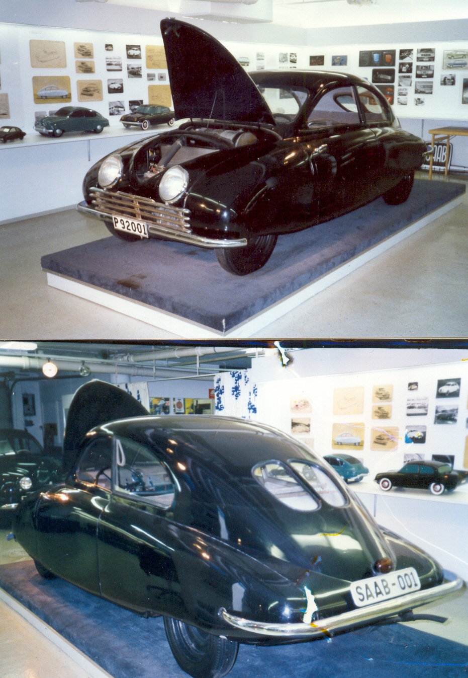 Saab 9200